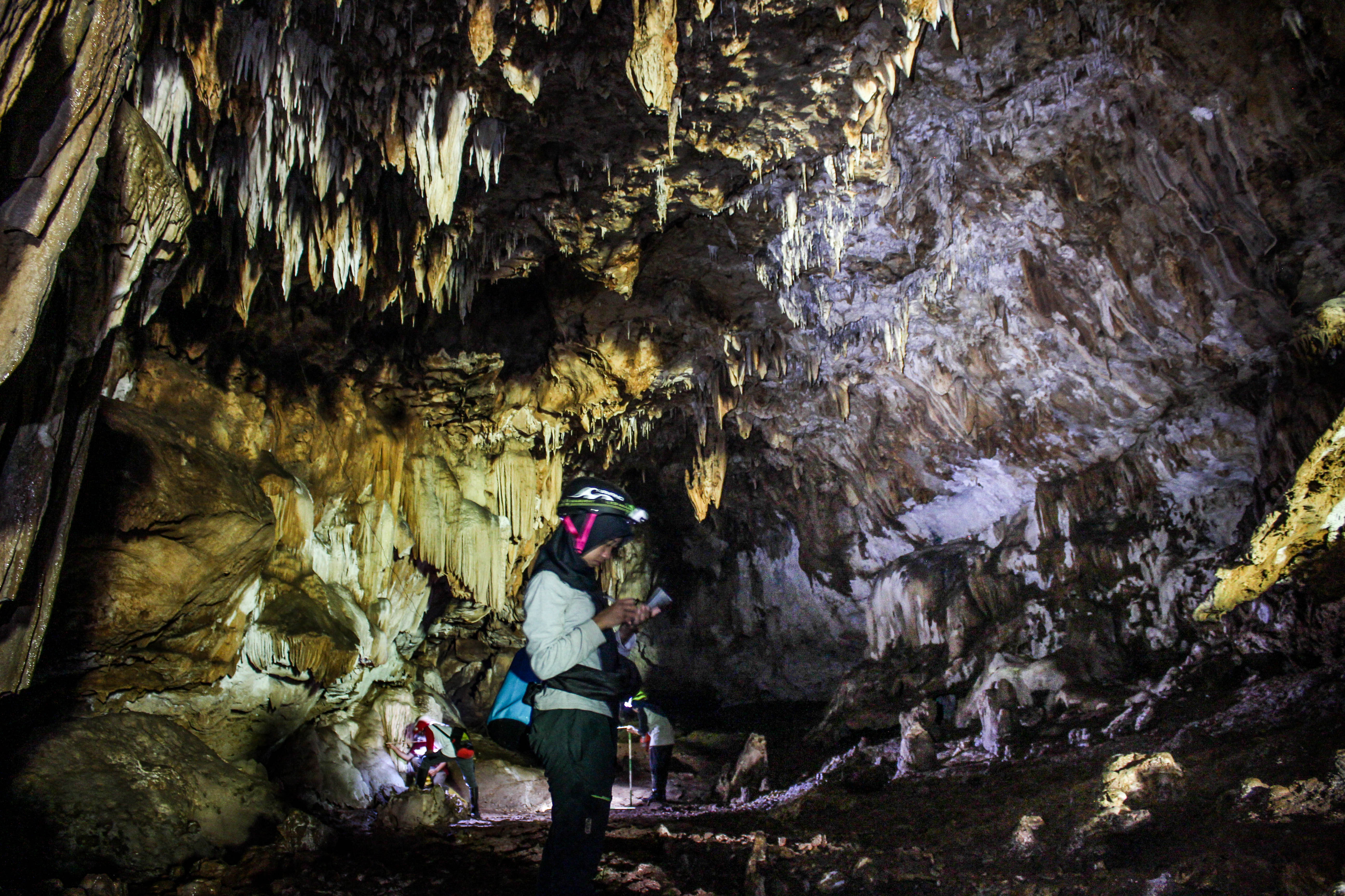 Penelusur goa sedang melakukan pemeetaan di goa Gambrit, kecamatan Donorojo, Pacitan. Pemetaan goa dilakukan mengetahui bagian-bagian goa tersebut, dan guna memberi informasi bagi pihak yang berkepentingan.